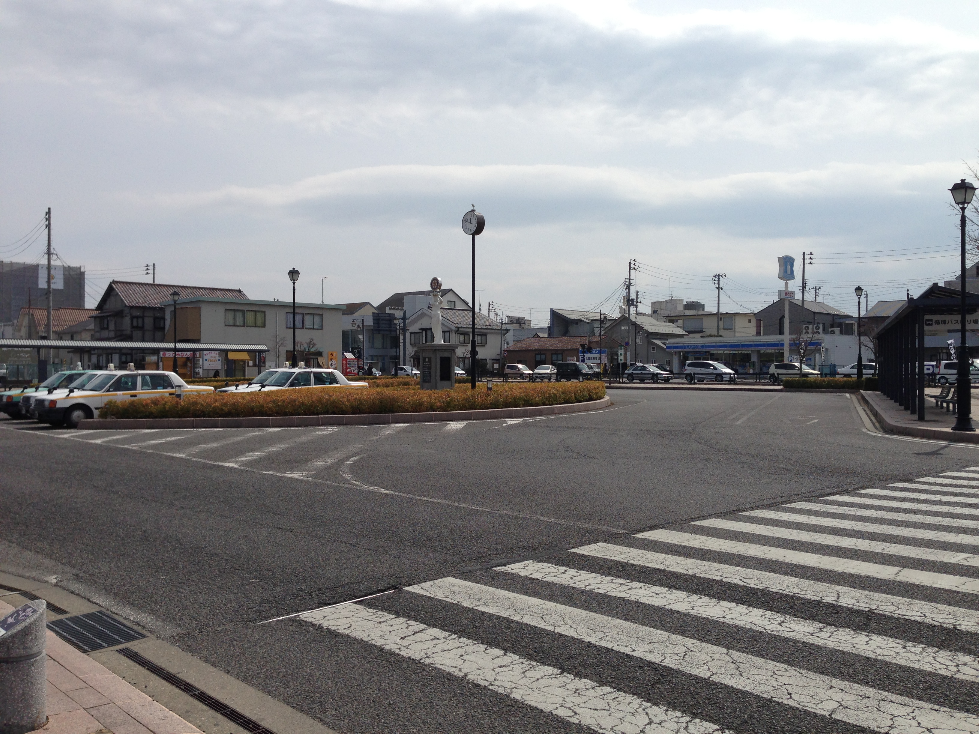 JR東北本線白河駅の駅前ロータリー